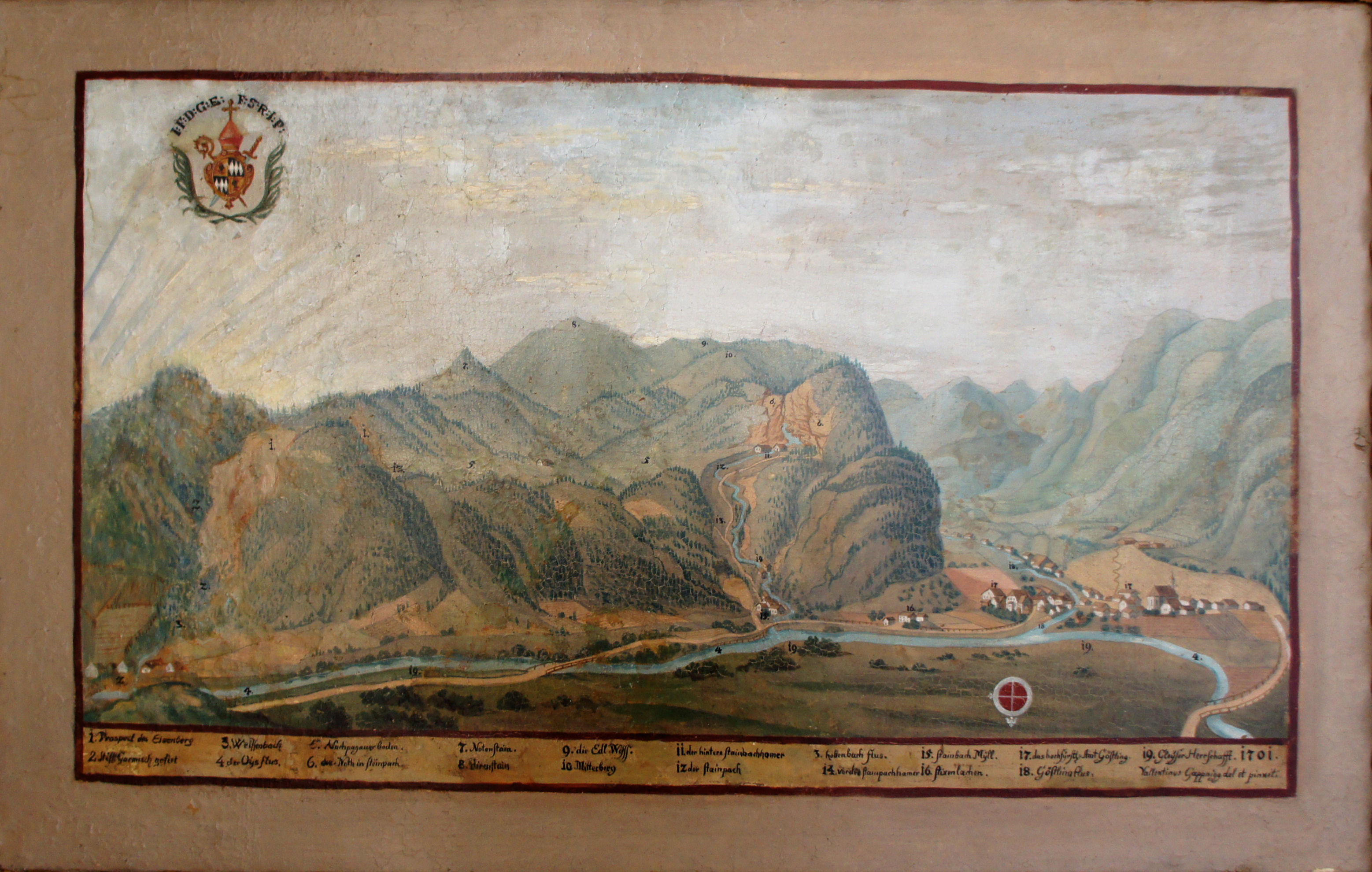 Gemälde aus einer Serie mit Darstellungen von Besitztümern des Hochstifts Freising im Fürstengang zwischen Fürstbischöflicher Residenz und Freisinger Dom.